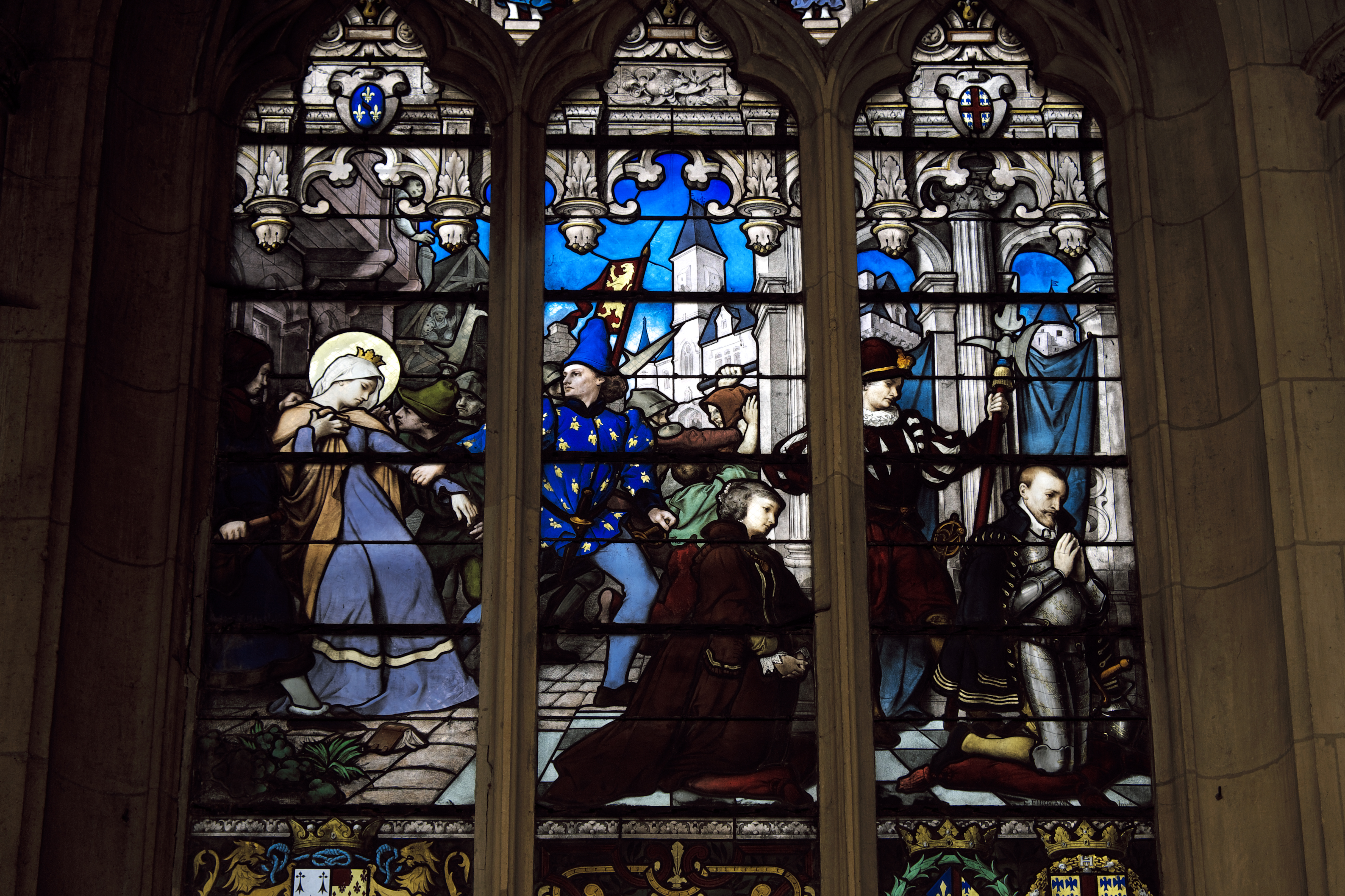 Katholische Pfarrkirche Saint-Martin (Collégiale Saint-Martin) in Montmorency, Bleiglasfenster Nr. 15 mit der Signatur F. EHRMANN und der Jahreszahl 1893, Darstellung: François de Montmorency (rechts) und Diana von Frankreich, Karton: Charles Leprévost, Ausführung: François Emile Ehrmann (siehe: Dominique Foussard, Charles Huet, Mathieu Lours: Églises du Val-d'Oise. Pays de France, Vallée de Montmorency. Société d'Histoire et d'Archéologie de Gonesse et du Pays de France, 2. Auflage, Gonesse 2011, ISBN 9782953155426); Ausschnitt